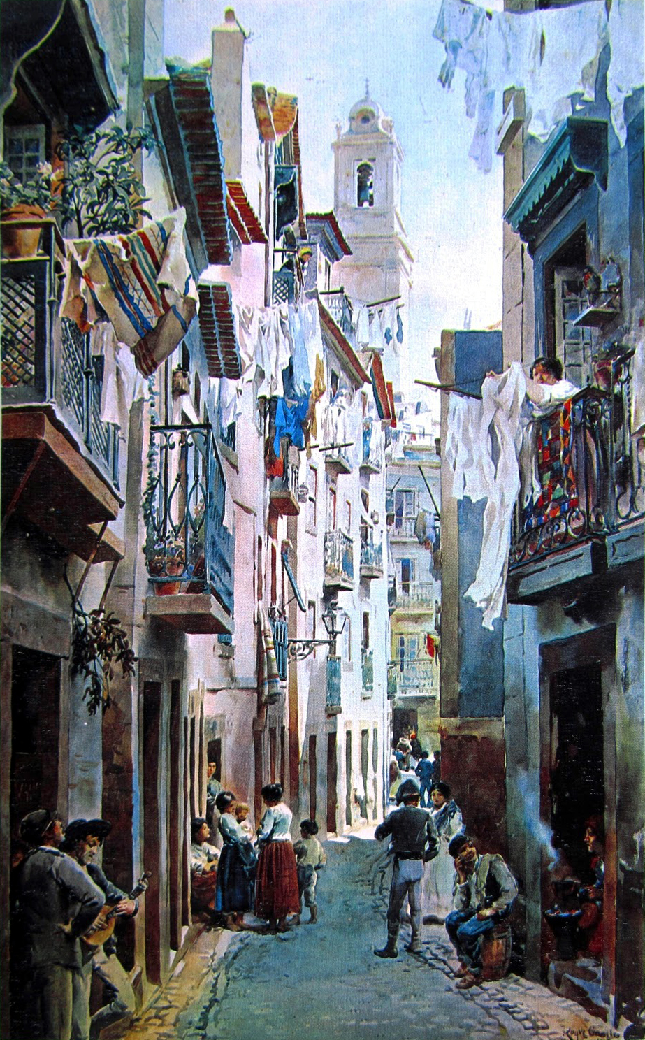 Rua de São Miguel, Alfama